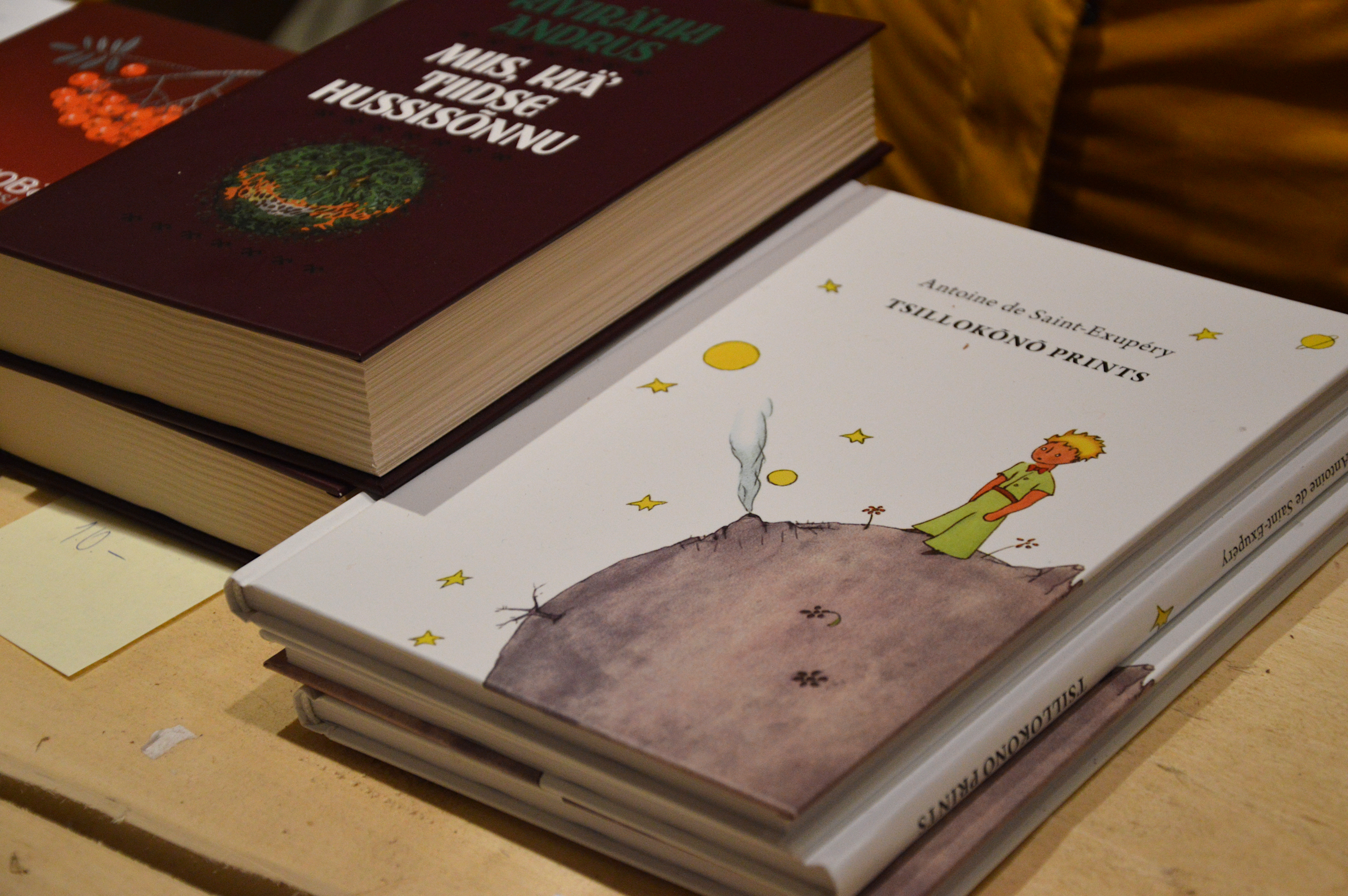 Setukeelsed raamatud